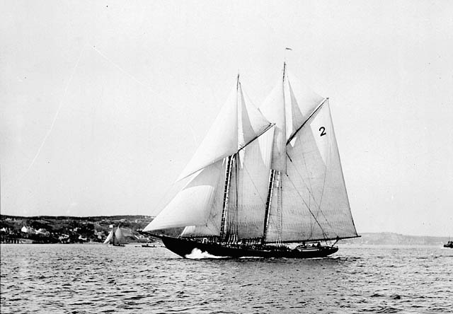 Vessel BLUENOSE under full sail.